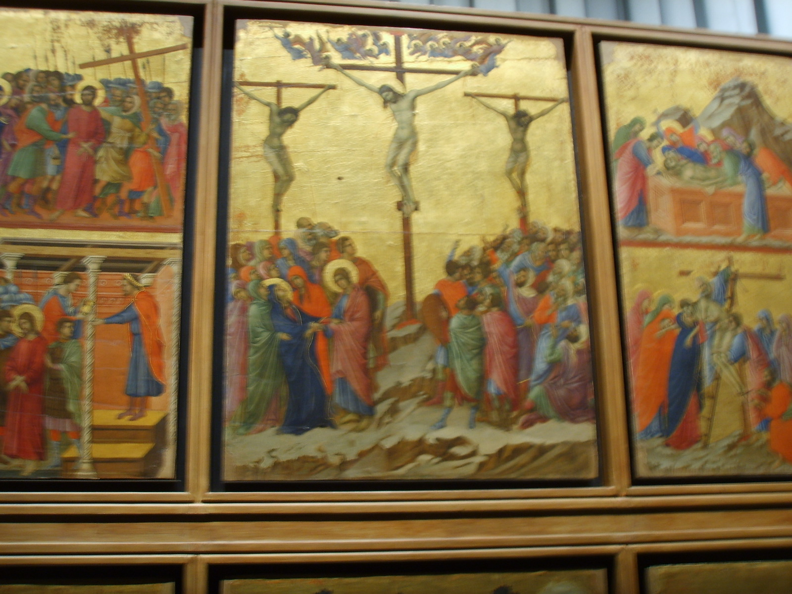 Majesty (Maestà), Crucifixion and panels by Duccio di Buoninsegna, Opera del Duomo Museum in Siena, Italy